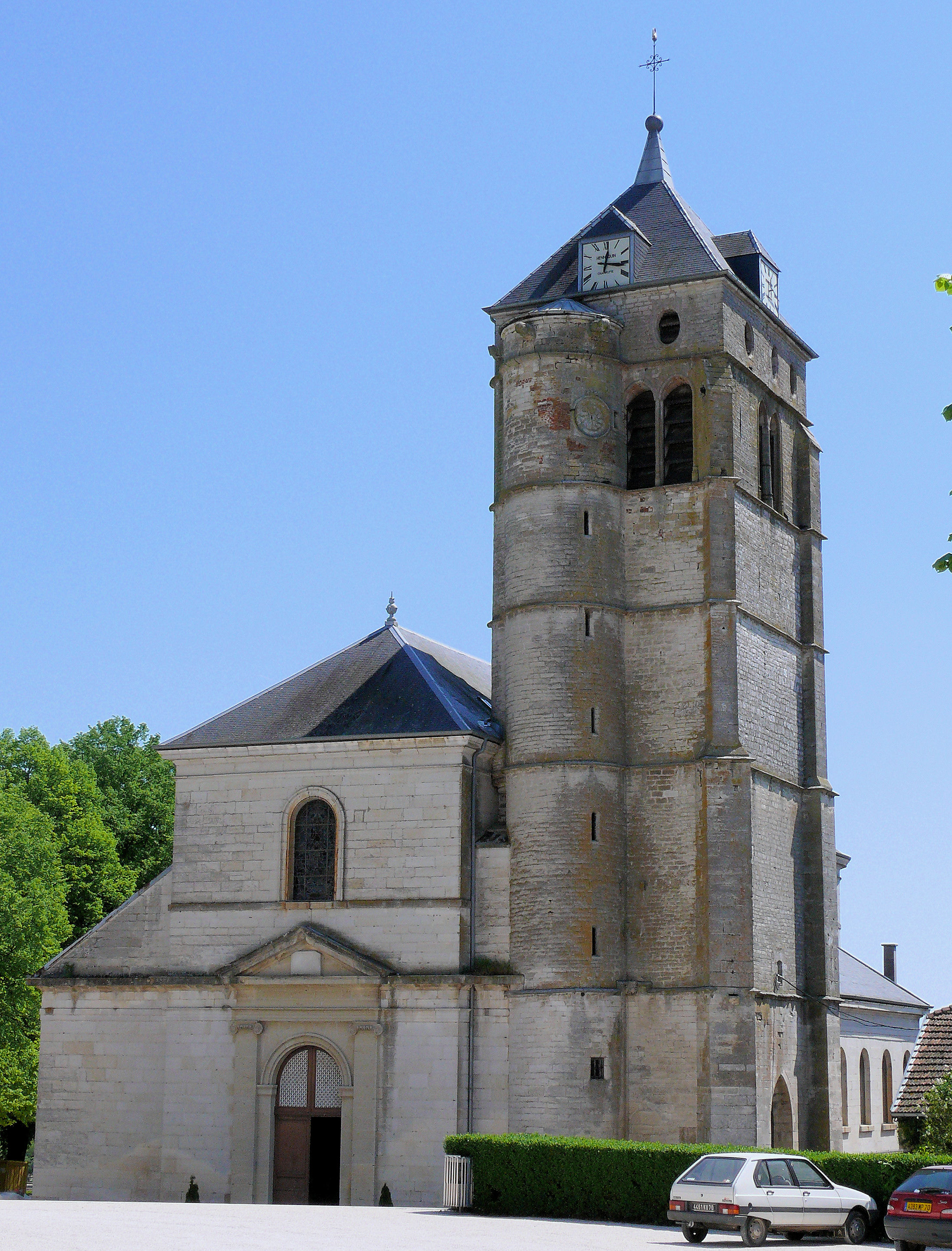 Champlitte - Eglise Saint-Christophe, à côté du château